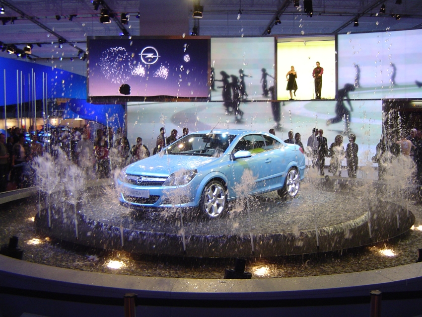 Beschreibung: Opelstand auf der IAA Quelle: selbst fotografiert Fotograf: O. Stapf "Credibility" Datum: September 2005 Foto: Digitalbild (größere Auflösung vorhanden)